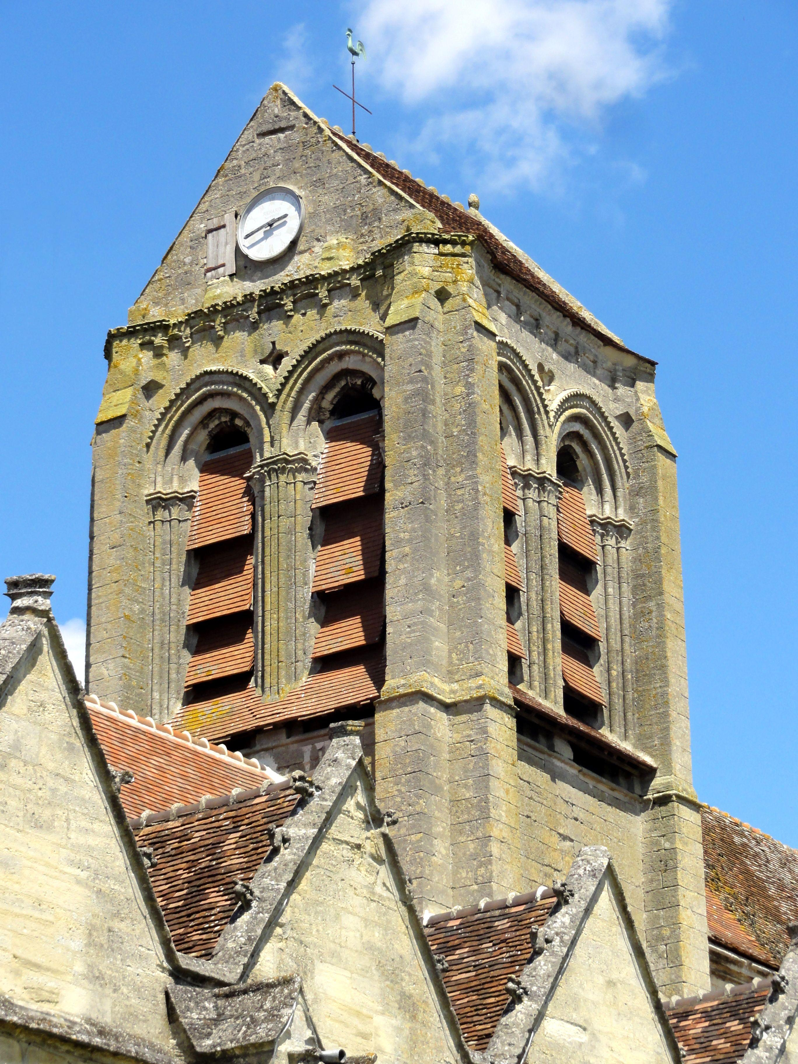 Clocher.